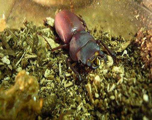 2007/06/24自己撮影画像撮影:利用者:ｋａｔｕｕｙａ 撮影日:2007年06月24日 撮影場所:東京都 名前：鹿児島県産ヒメオオクワガタ 採集：2006年11月04日 羽化：2007年06月24日